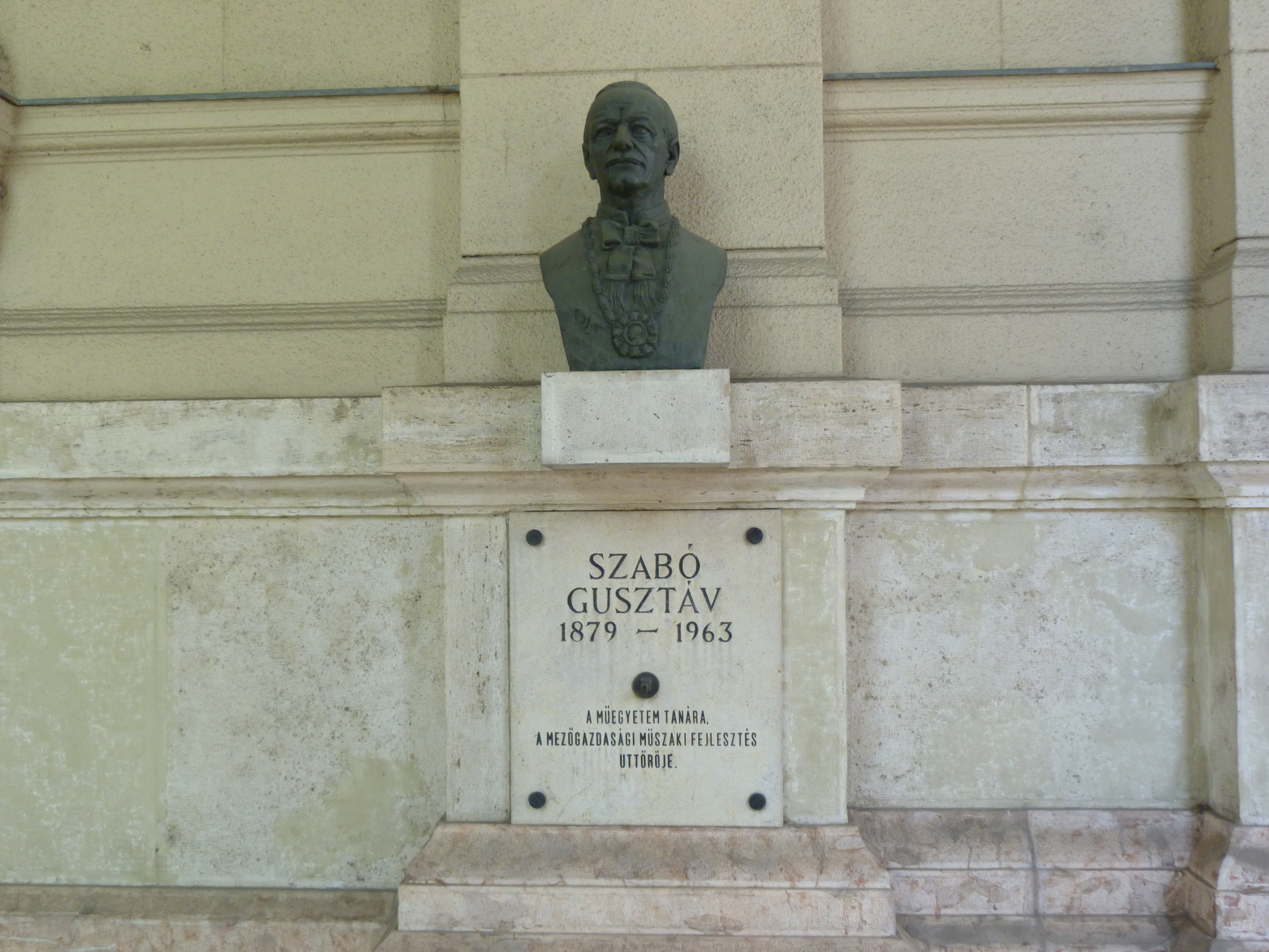 A felvétel 2012. május 19 -én készült Budapesten a Kossuth téren. A Mezőgazdasági és Vidékfejlesztési Minisztérium falánál Szabó Gusztáv szobra.